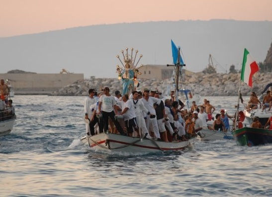 Processione a mare Madonna dell'Alto Mare Palmi